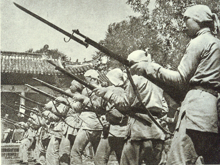 冀中军区回民支队进行刺杀训练